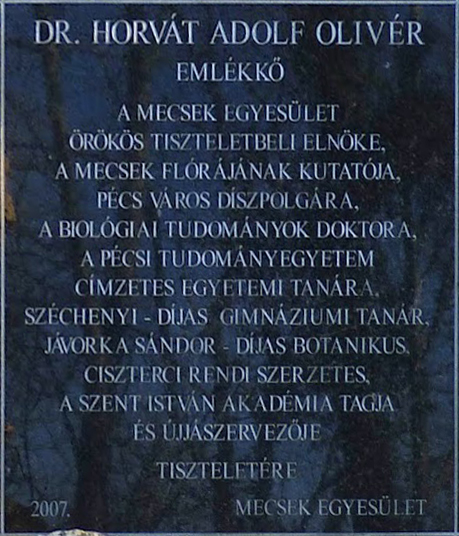 Dr. Horvát Adolf Olivér emlékköve (Nyugat-Mecsek, a Vörös-hegy déli oldalán)